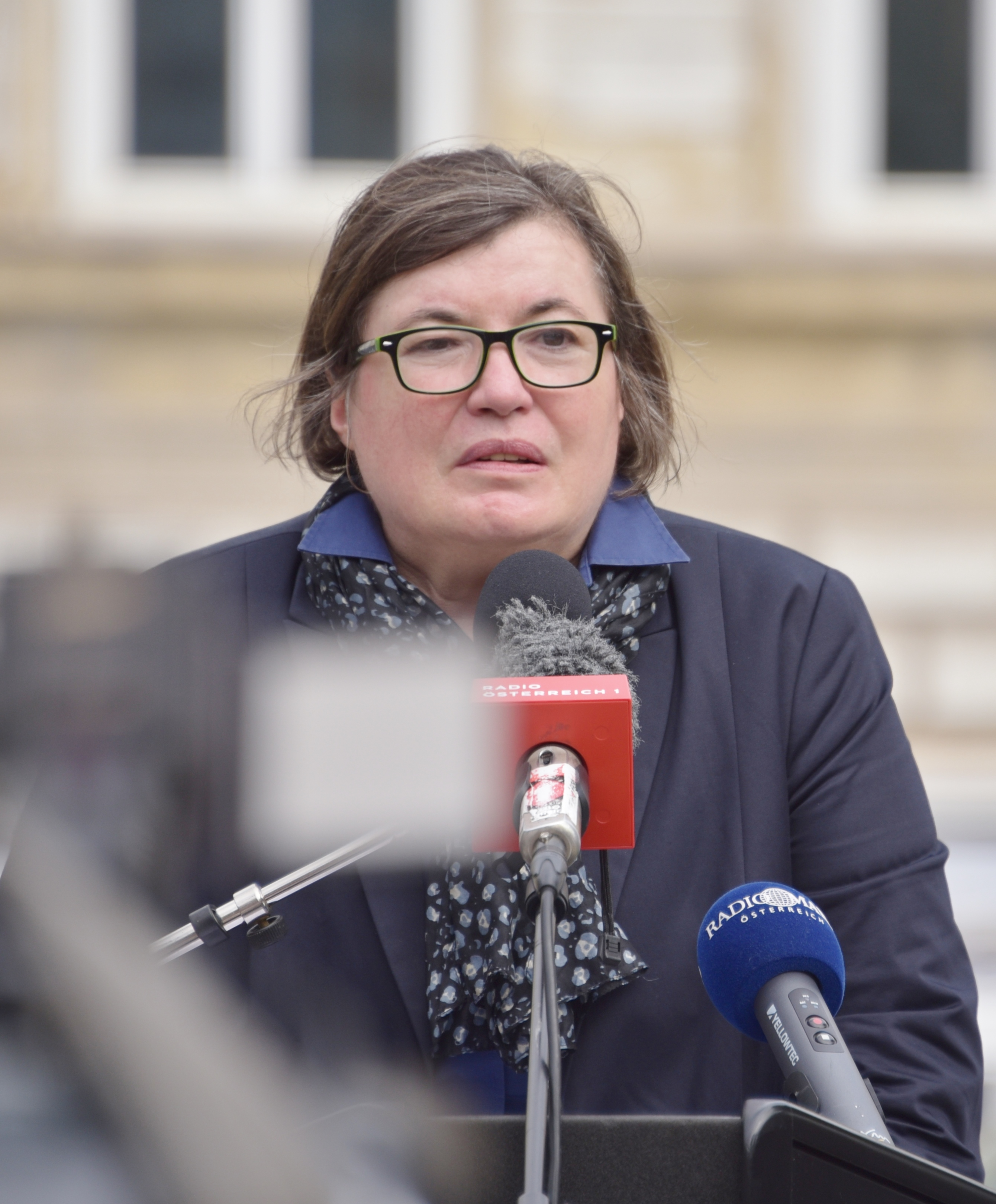 Heidemarie Uhl während der Einweihung des Aspangbahnhof-Mahnmals